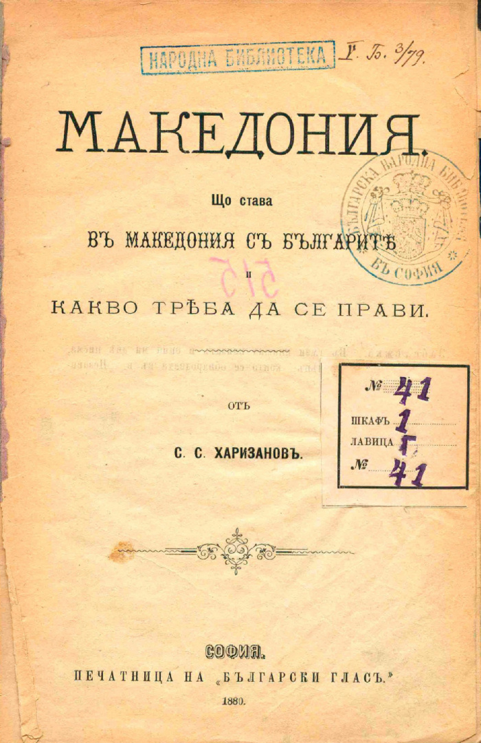 „Македония. Що става в Македония с българите и какво трябва да се прави“